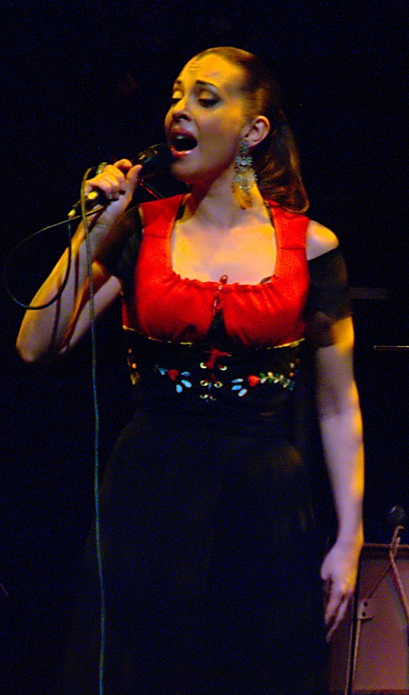 Teresa Salgueiro in concerto con Lusitania Ensemble a Costabissara nel 2009